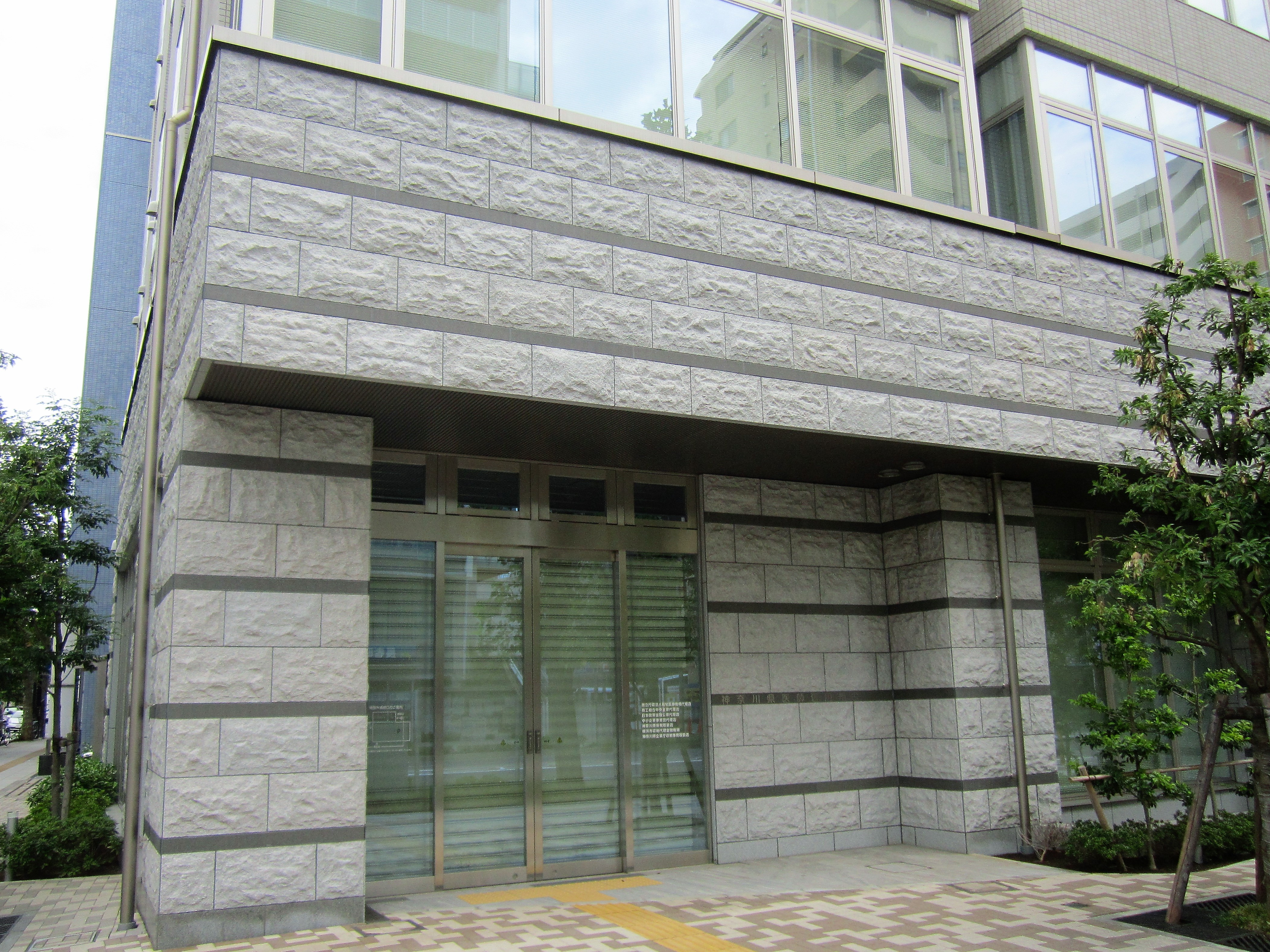 神奈川県医師信用組合本店（横浜市中区長者町）